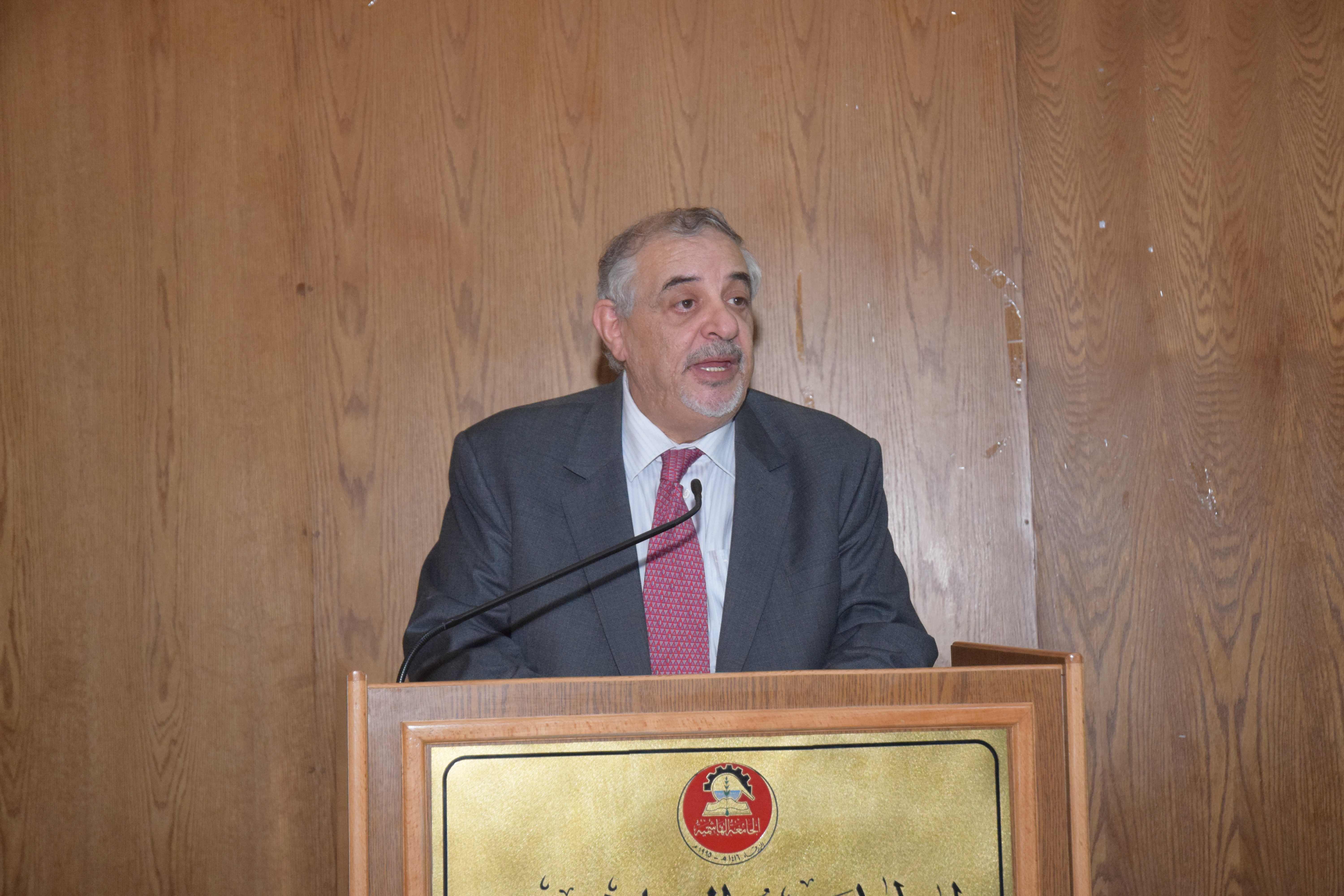 تكريم النسخة الثانية من طلاب برنامج التعليم